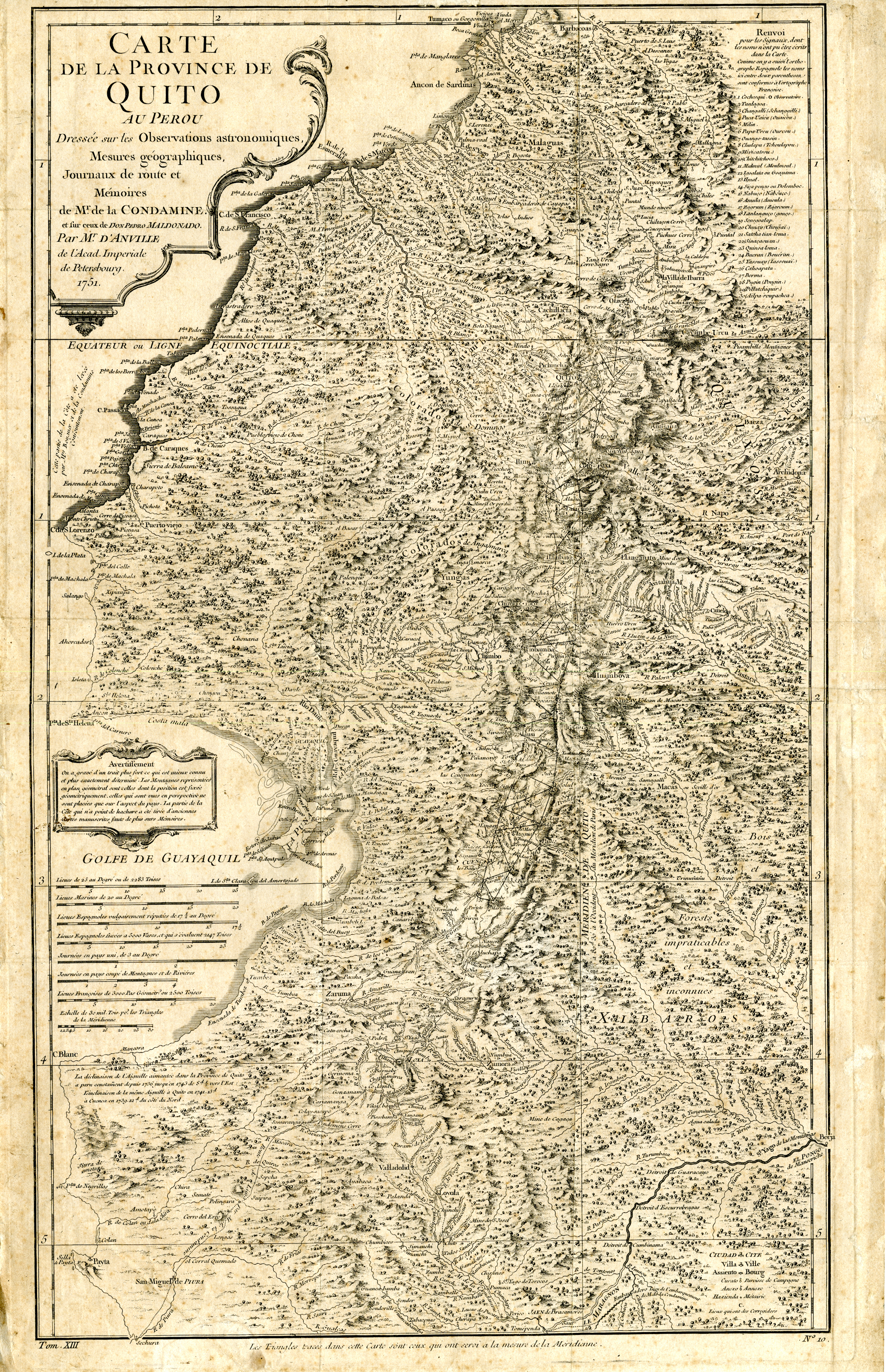 De Ulloa, Antonio y Jorge Juan. Relación Histórica del Viaje a la América Meridional, hecho de Orden de Su Majestad Católica para medir algunos Grados de Meridiano Terrestre, y venir por ellos en conocimiento de la verdadera Figura y Magnitud de la Tierra, con otras varias Observaciones Astronómicas y Físicas. Por Don Jorge Juan Comendador de Aliaga, en la Orden de San Juan, Socio correspondiente de la Real Academia de las Ciencias de París; y Don Antonio de Ulloa de la Real Sociedad de Londres: ambos por Capitanes de Fragata de la Real Armada. Primera Parte / Tomo I. Impresa por la Orden del Rey Nuestro Señor en Madrid por Antonio Marín, Año de MCDDXLVIII (1748).Diapositiva de Consulta y acceso publico cuya información fue investigada de un libro y/o ejemplar de revisión custodiado en los Fondos Bibliográficos (Sección Siglo XVIII o Etapa Colonial) del Archivo Histórico del Guayas; Guayaquil, Ecuador.Consultado y compartido por el usuario J. Javier García A.